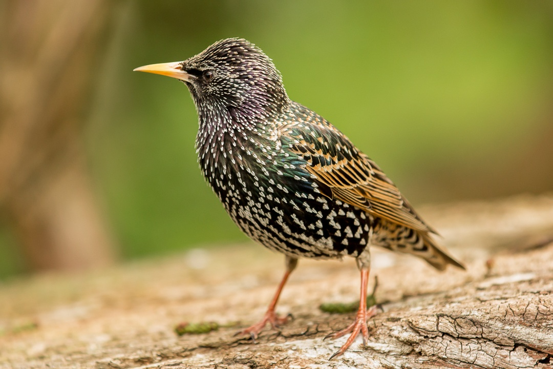 Starling